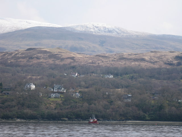 Portincaple